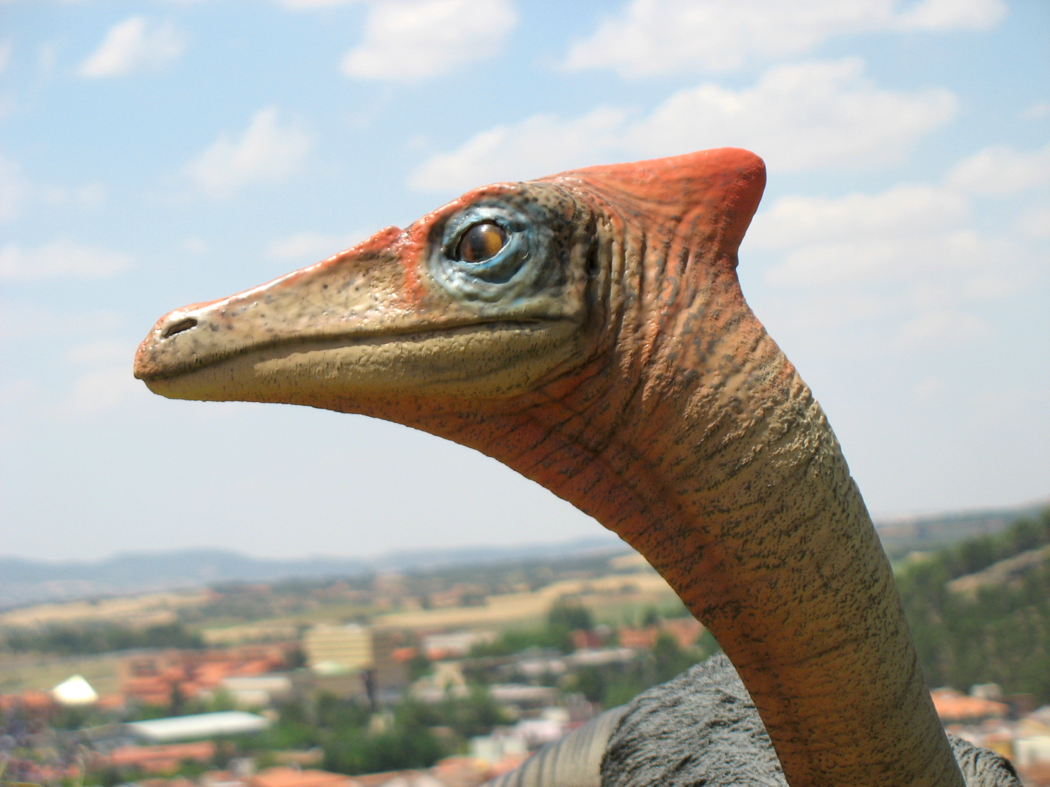 Figura de Pelecanimimus polyodon de Las Hoyas - Museo Paleontológico de Castilla-La Mancha (Cuenca)